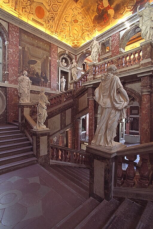 Slottets trapphus av Tessin, skulptural utsmyckning av N.Millich. Motiv: Drottningholm Nyckelord: Byggnadsminnen:Statl, Världsarv Kategori: Slott Slottets trapphus av Tessin, skulptural utsmyckning av N.Millich.